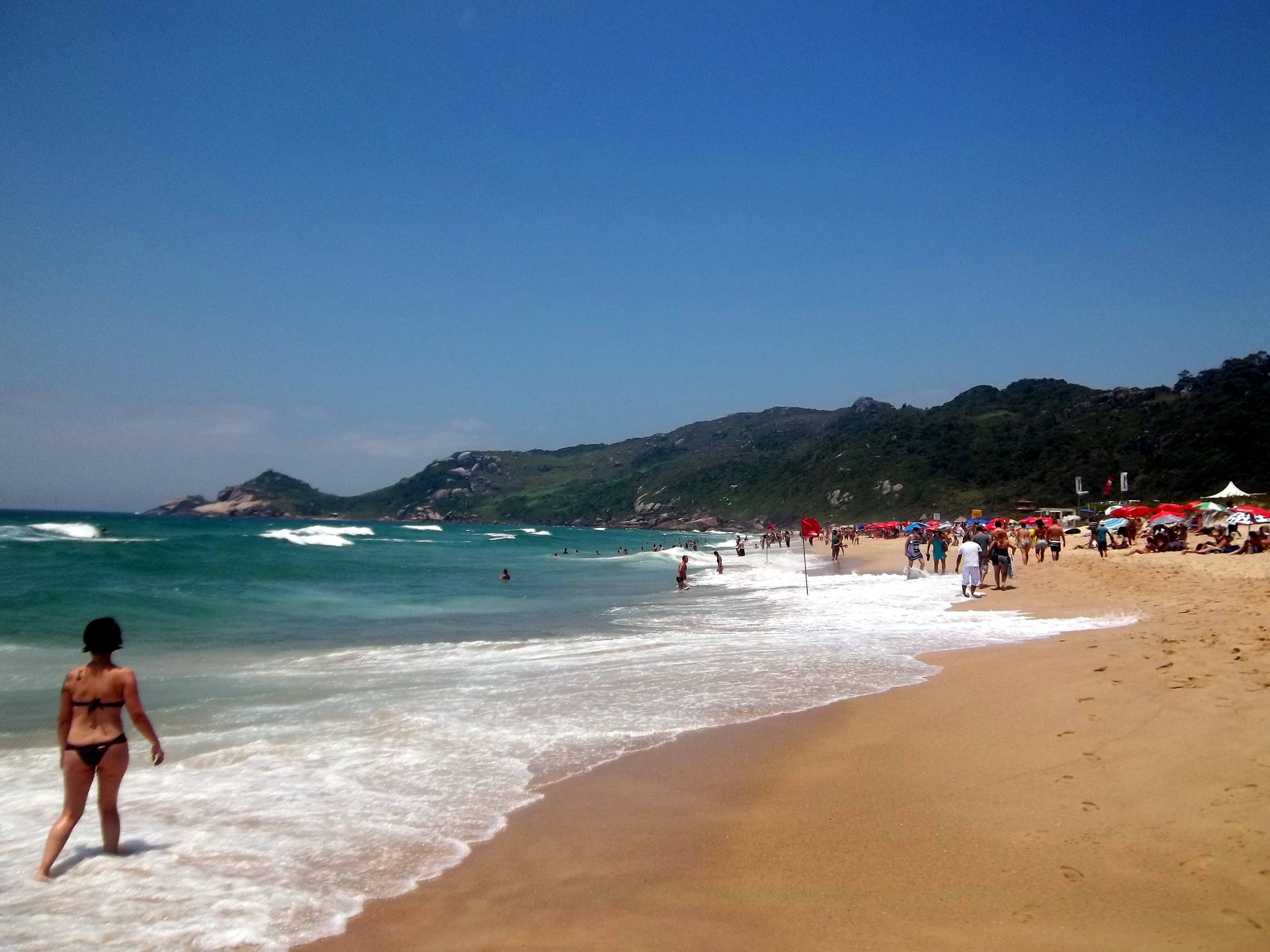 Praia Mole - Florianópolis - Brasil